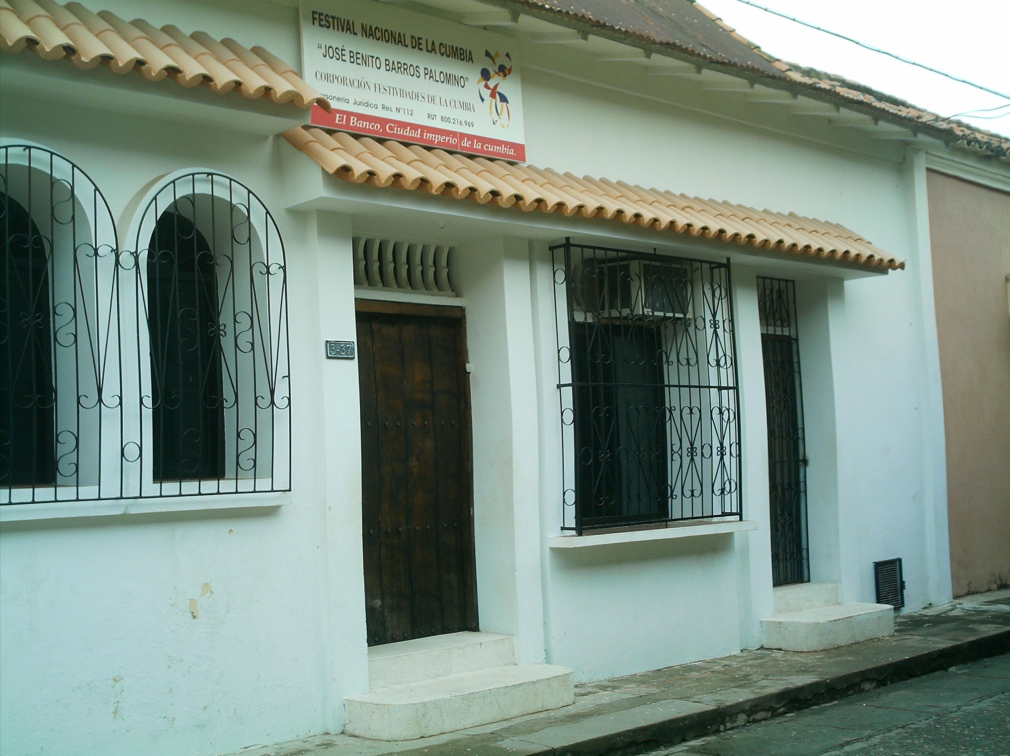 Casa de el Maestro Jose Benito Barros Palomino, el mas grande compositor de colombia, nacido en El Banco (Magdalena)